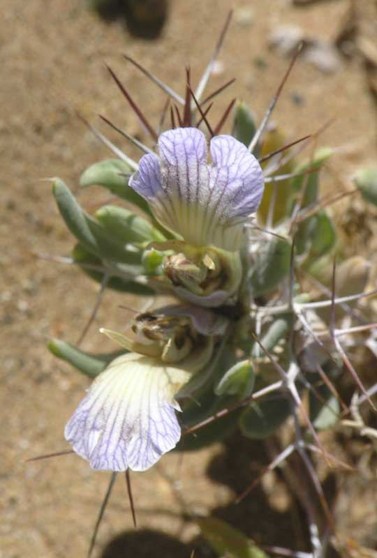 Blepharis mitrata at Klein Aus, Namibia